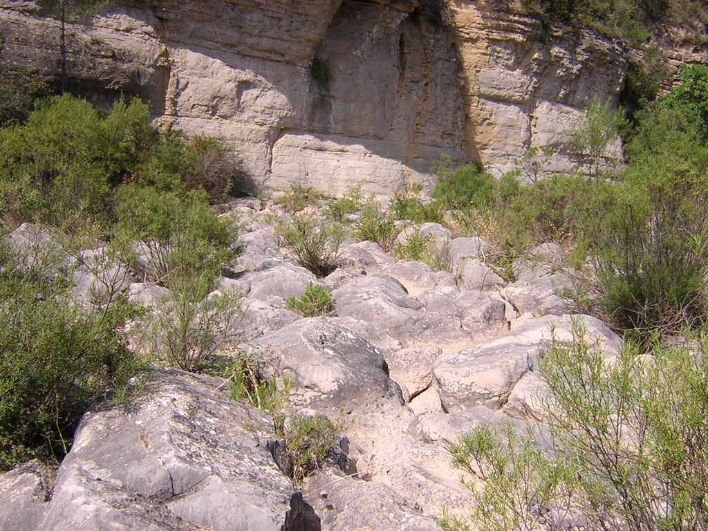 Les Cabres Encantades (Monistrol de Calders, Moianès)